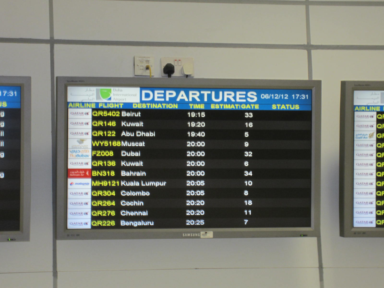 கத்தார் விமான நிலைய புறப்பட்டு பலகை